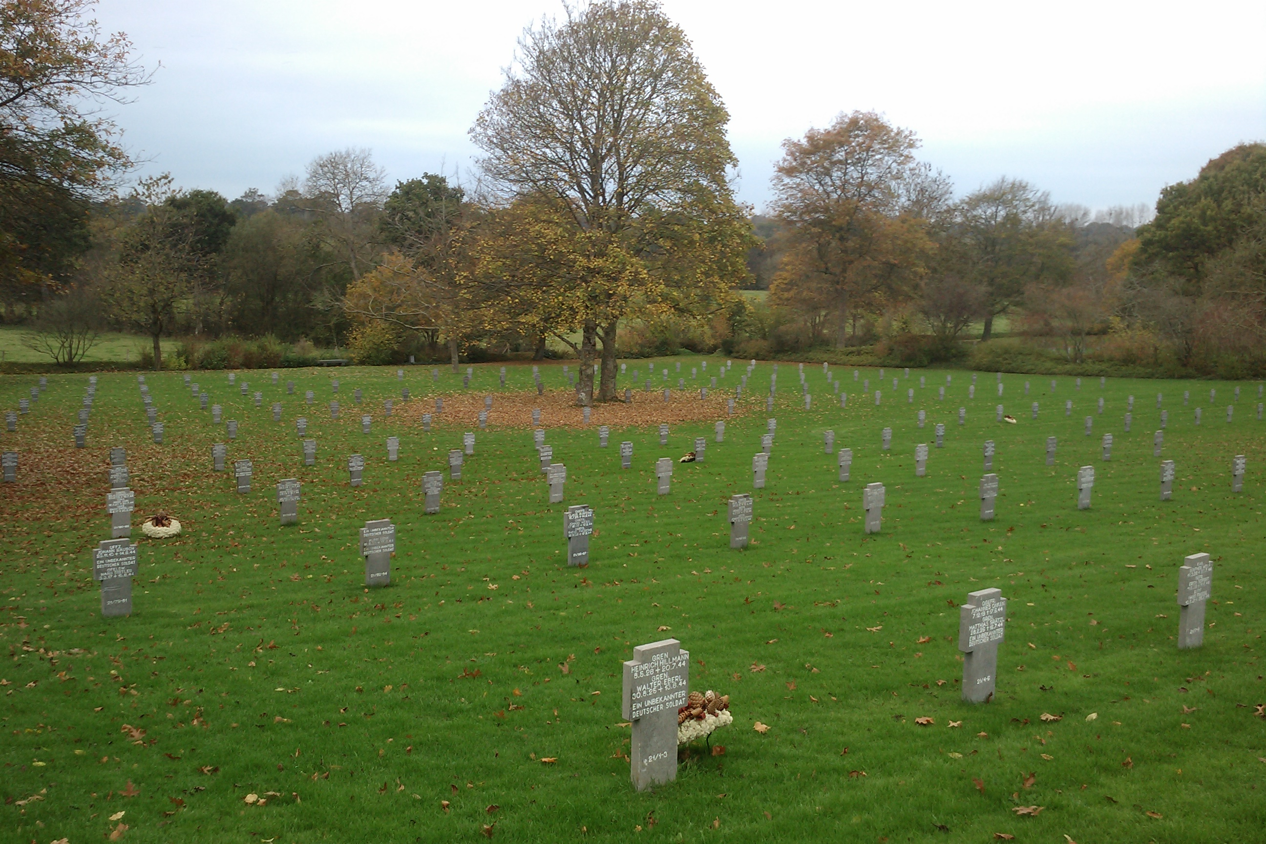 Cimetière militaire allemand d'Orglandes